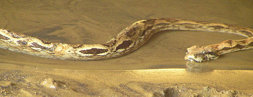 Madagascar ground boa Acrantophis madagascariensis